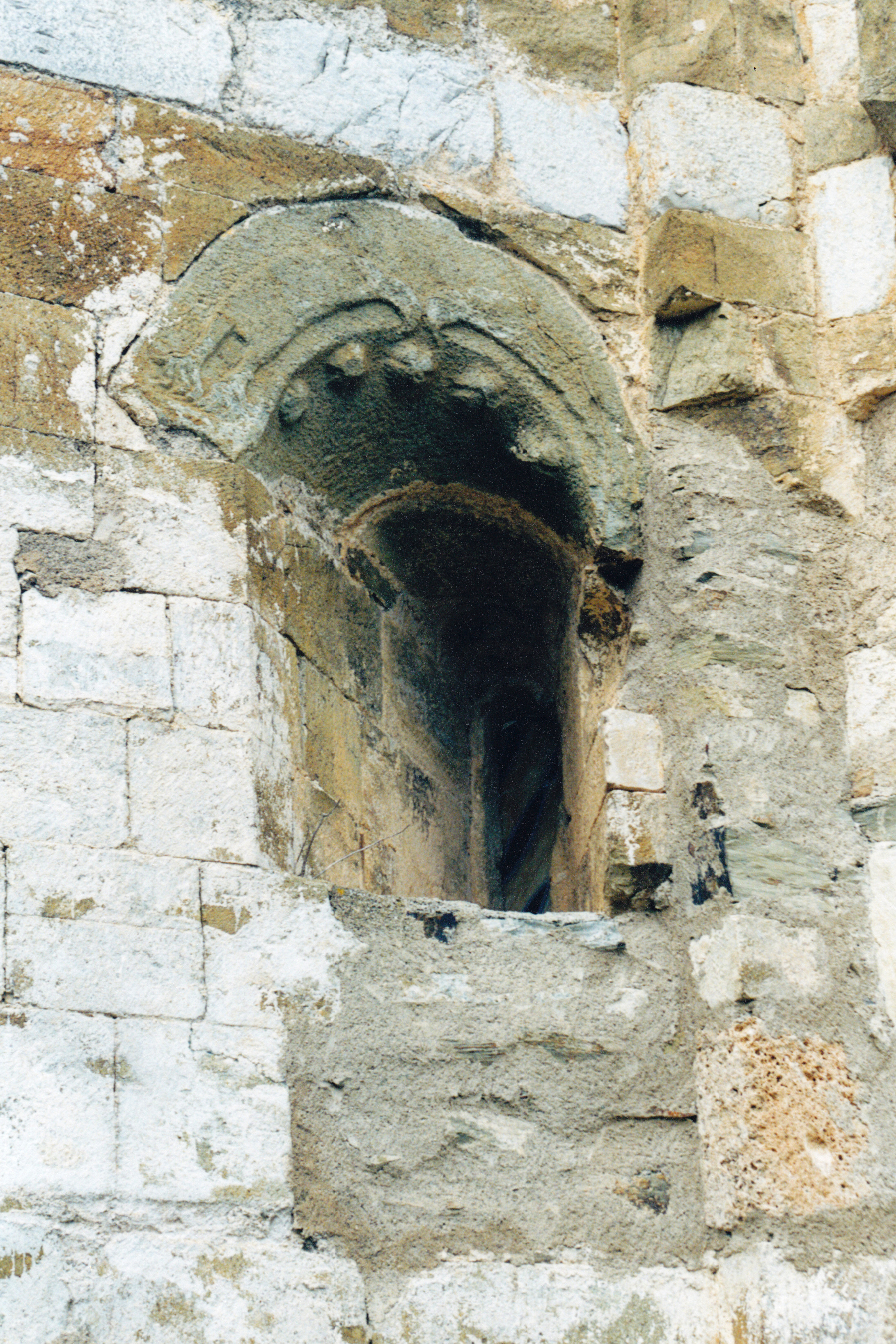 France - Pyrénées-Orientales - Aspres - Église Saint-Félix de Calmeilles